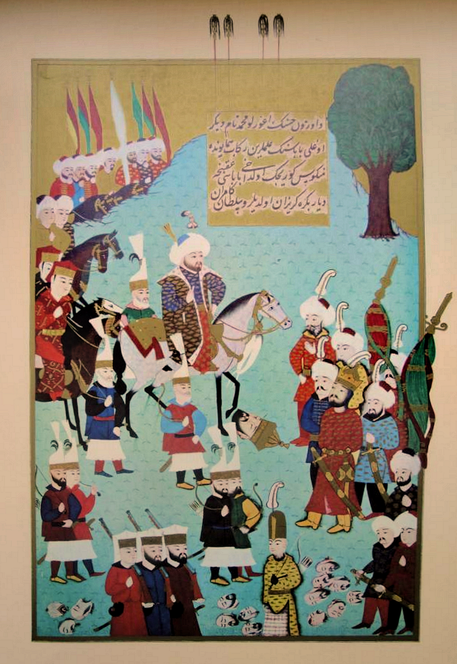 Uzun Hasan'in oglu Ugurlu Mehmed Bey ve Fatih